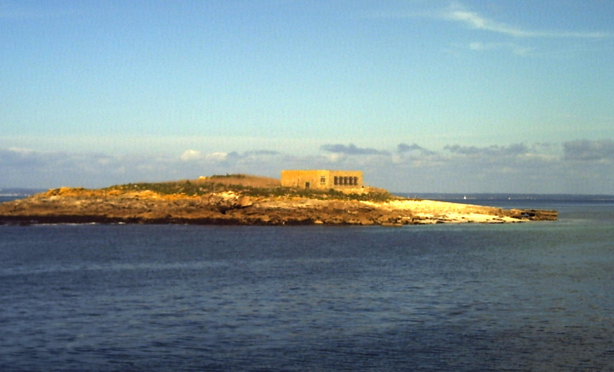 Îlot de Brunec, dans l'archipel des Glénan